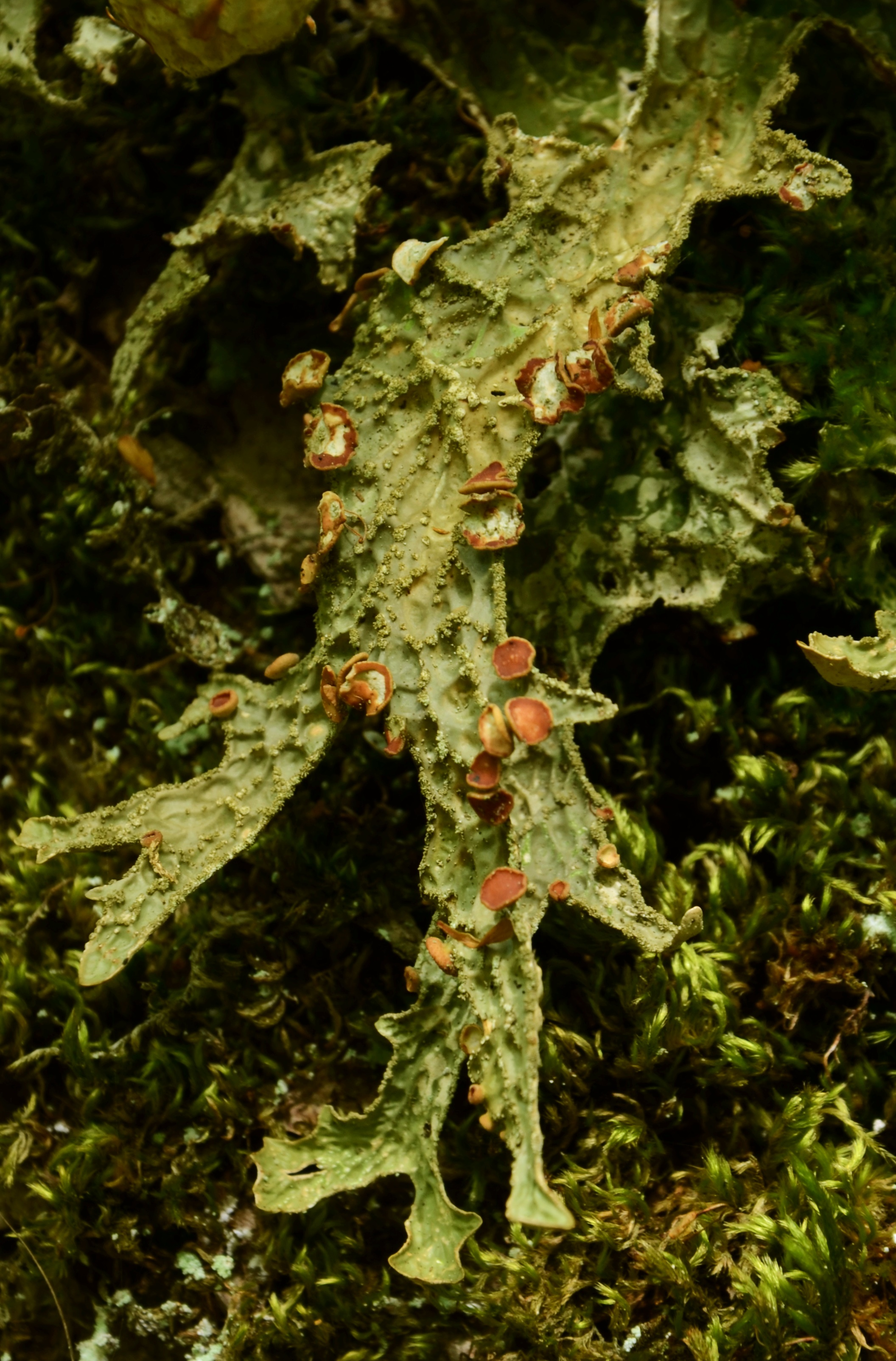 Harilik kopsusamblik viljakehadega